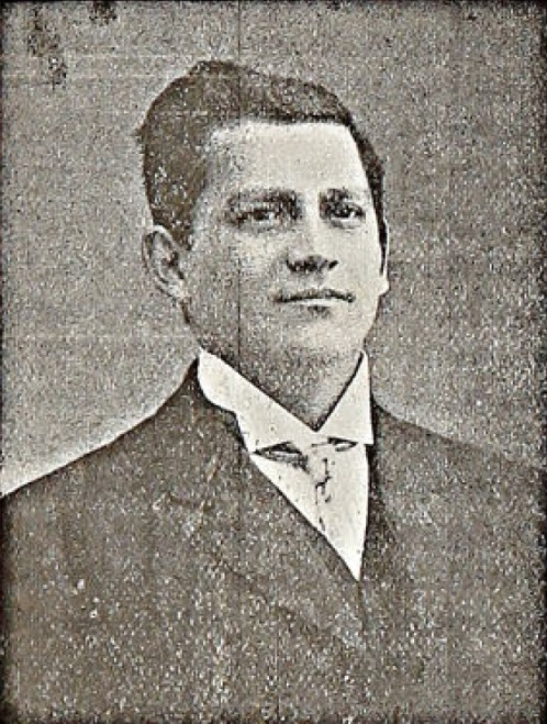 Nicasio Retamales Leiva (San Bernardo, 25 de octubre de 1876 — Santiago, 18 de julio de 1946) fue un político chileno, militante del Partido Demócrata (PD). Fue dirigente social y también ejerció como diputado entre 1926 y 1937.